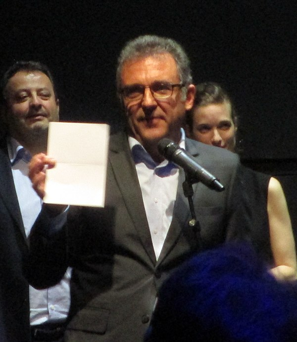 Andreas Homoki, Intendant Opernhaus Zürich